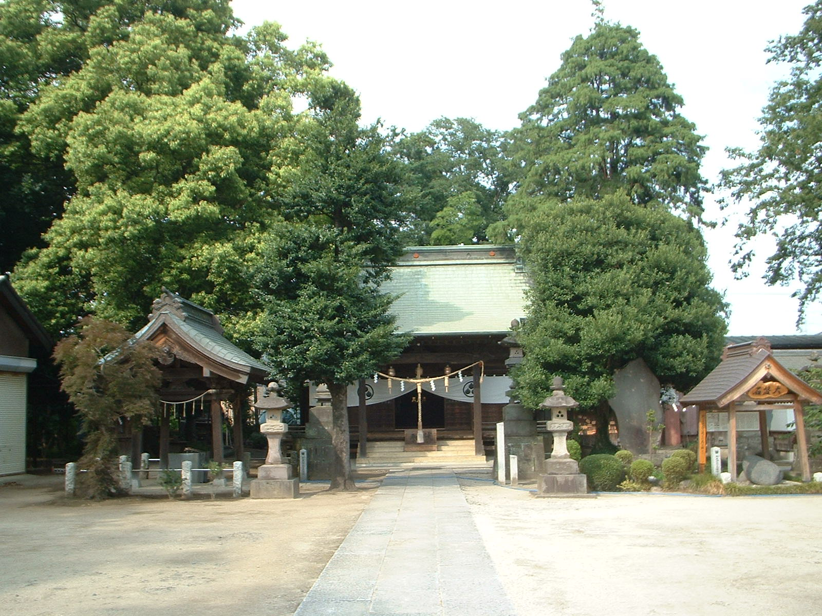 右に見えるのが大盤石。左側には別の神社がいくつかある。